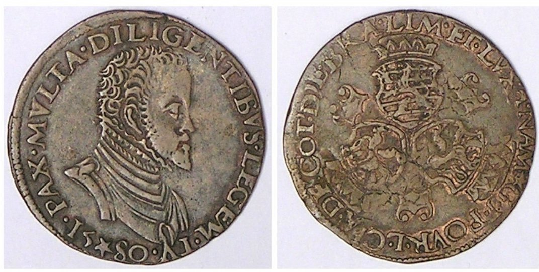 Jeton Maastricht 1580. Foto van eigen exemplaar.